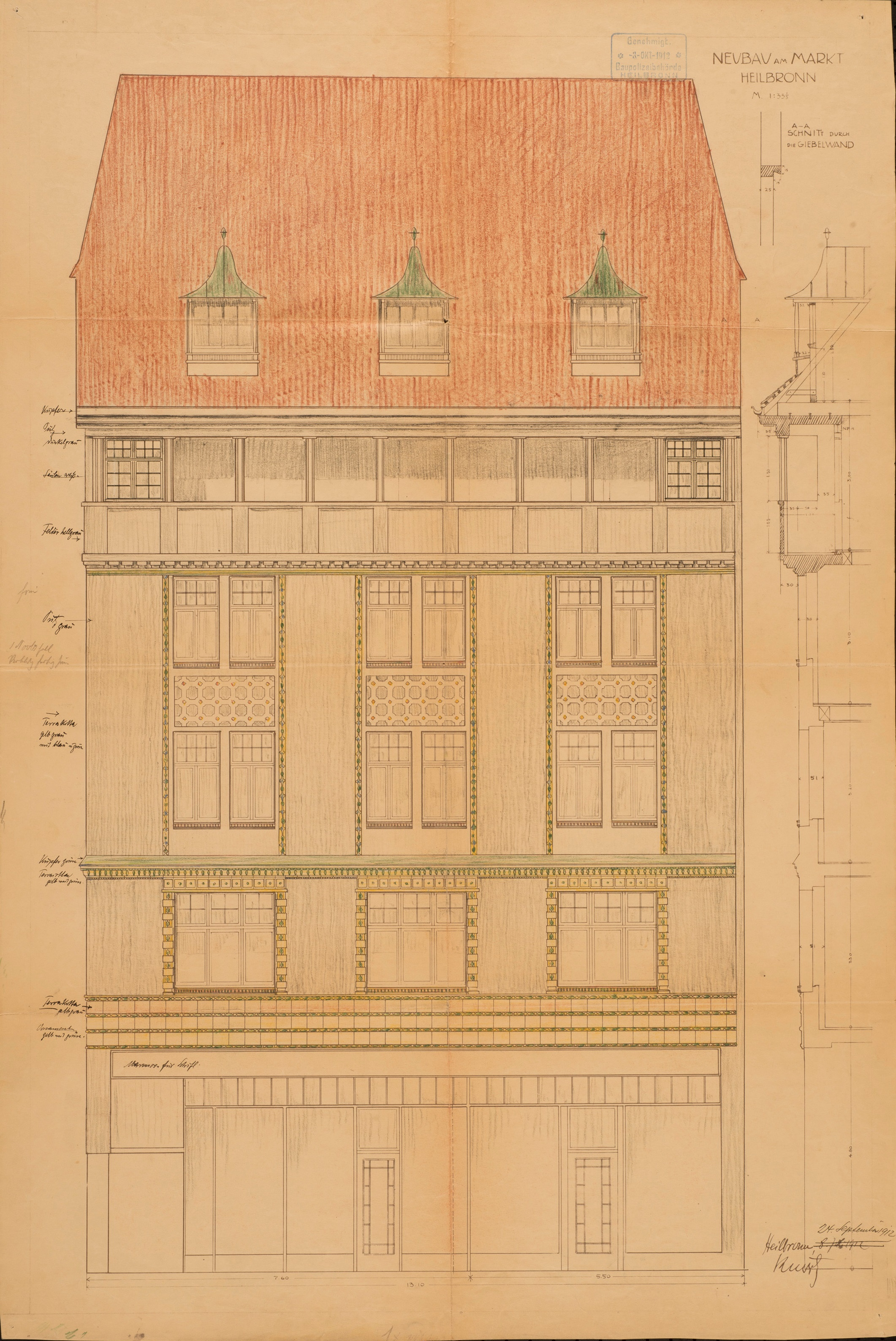 Heilbronn, Kaiserstraße 30, ausgeführte Fassade von 1912, Entwurf Ludwig Knortz (* 5. Oktober 1879; † 3. November 1936)